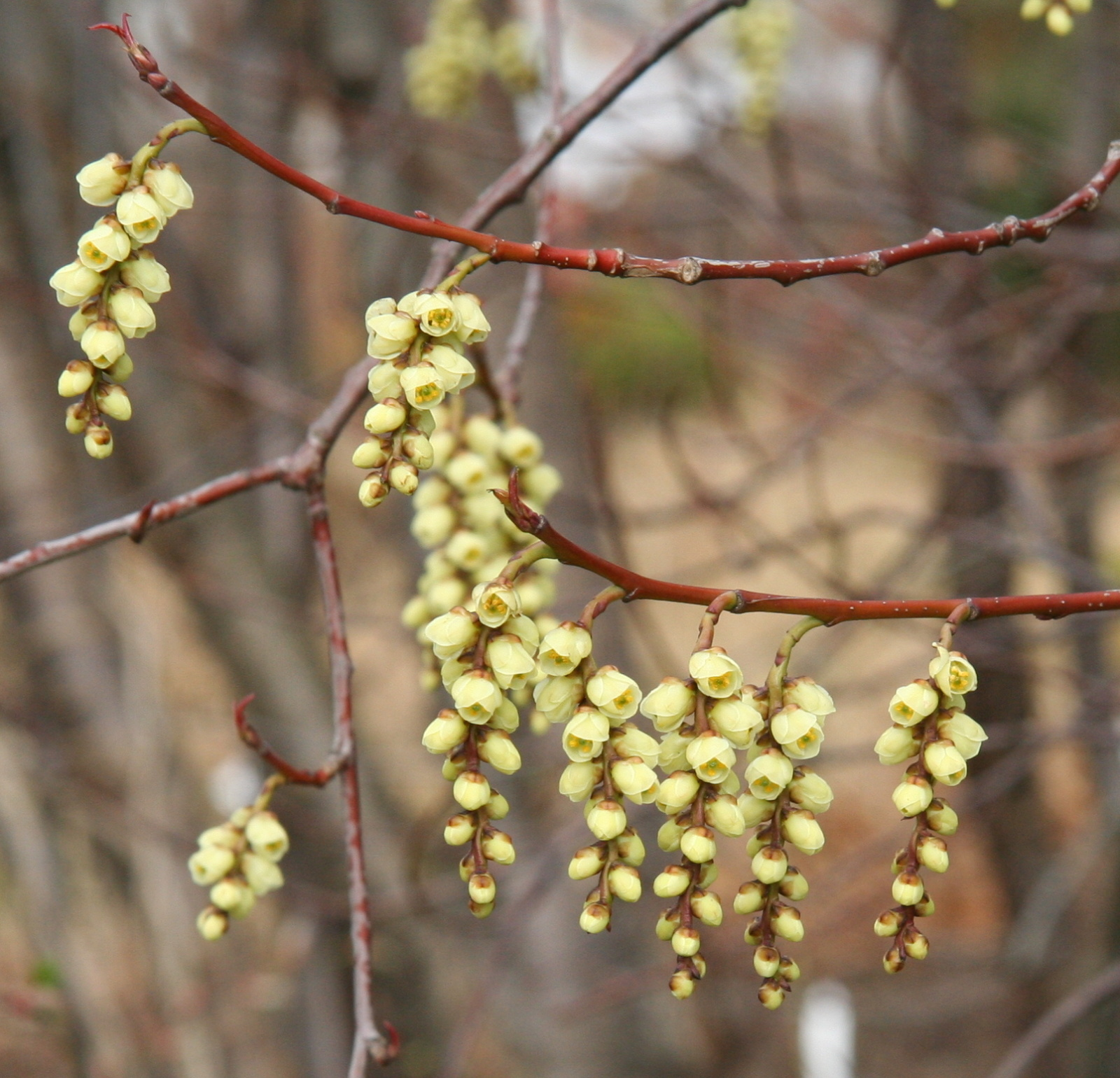 Stachyurus praecox im Botanischen Garten Dresden